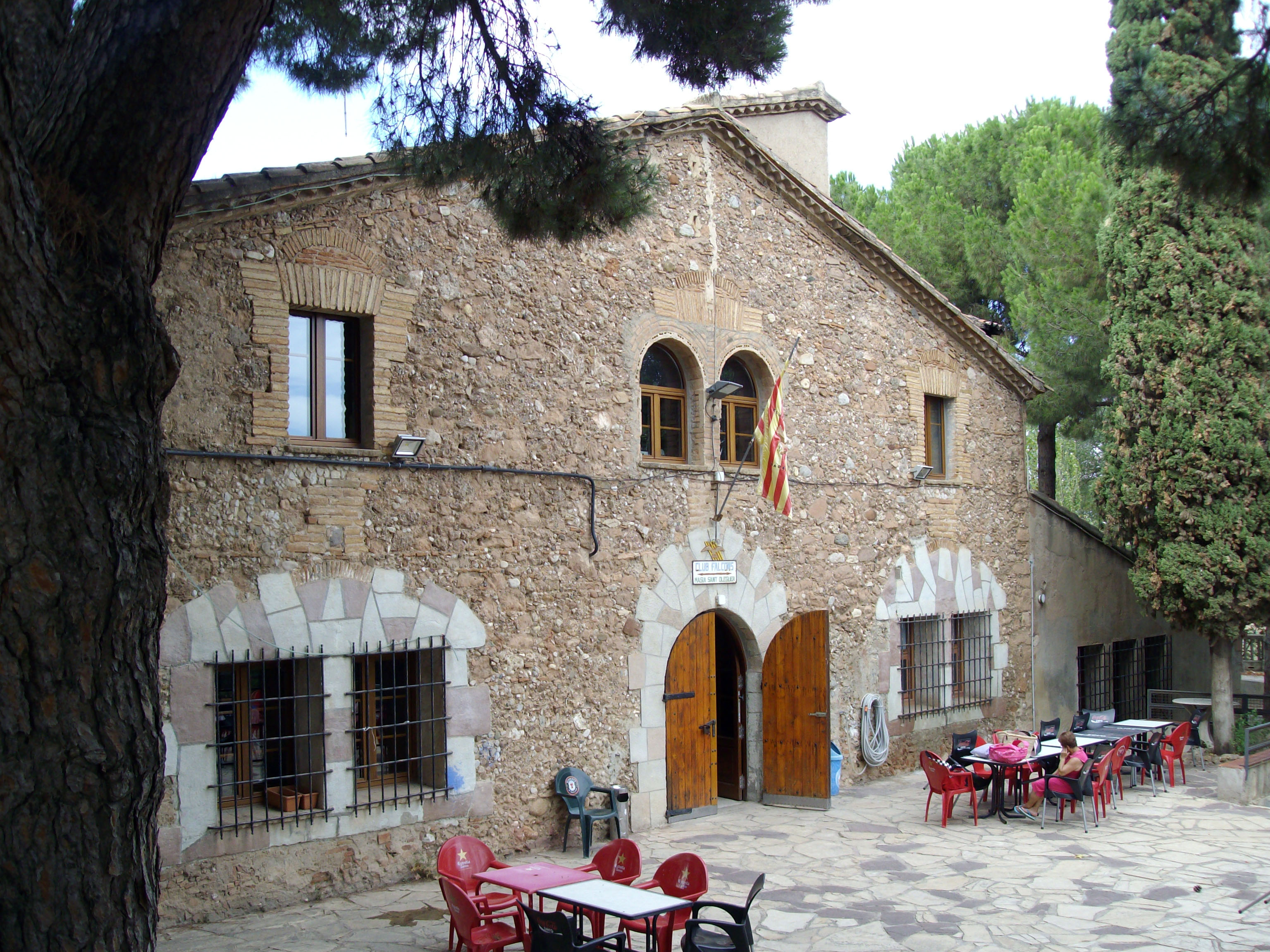 Masía de Sant Oleguer, construida en el siglo XIII, situada en la calle d' Osaka, 10, de Sabadell, Barcelona (España). Actualmente es la sede de la entidad deportiva "Club Falcons".